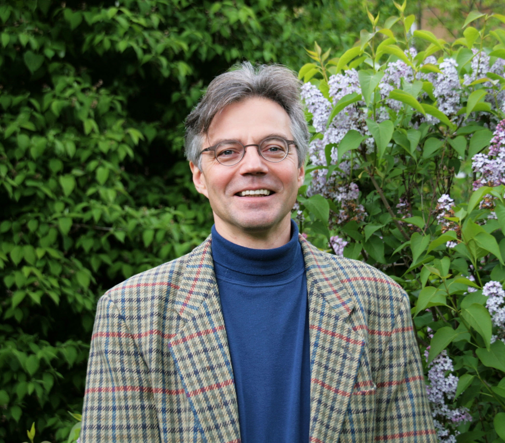 Prof. Dieter D. Genske